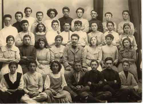 Herzliya Gymnasium first class with their teacher haim harari blumberg תלמידי ותלמידות מחזור א' של גימנסיה הרצליה עם המורה שלהם חיים הררי בלומברג